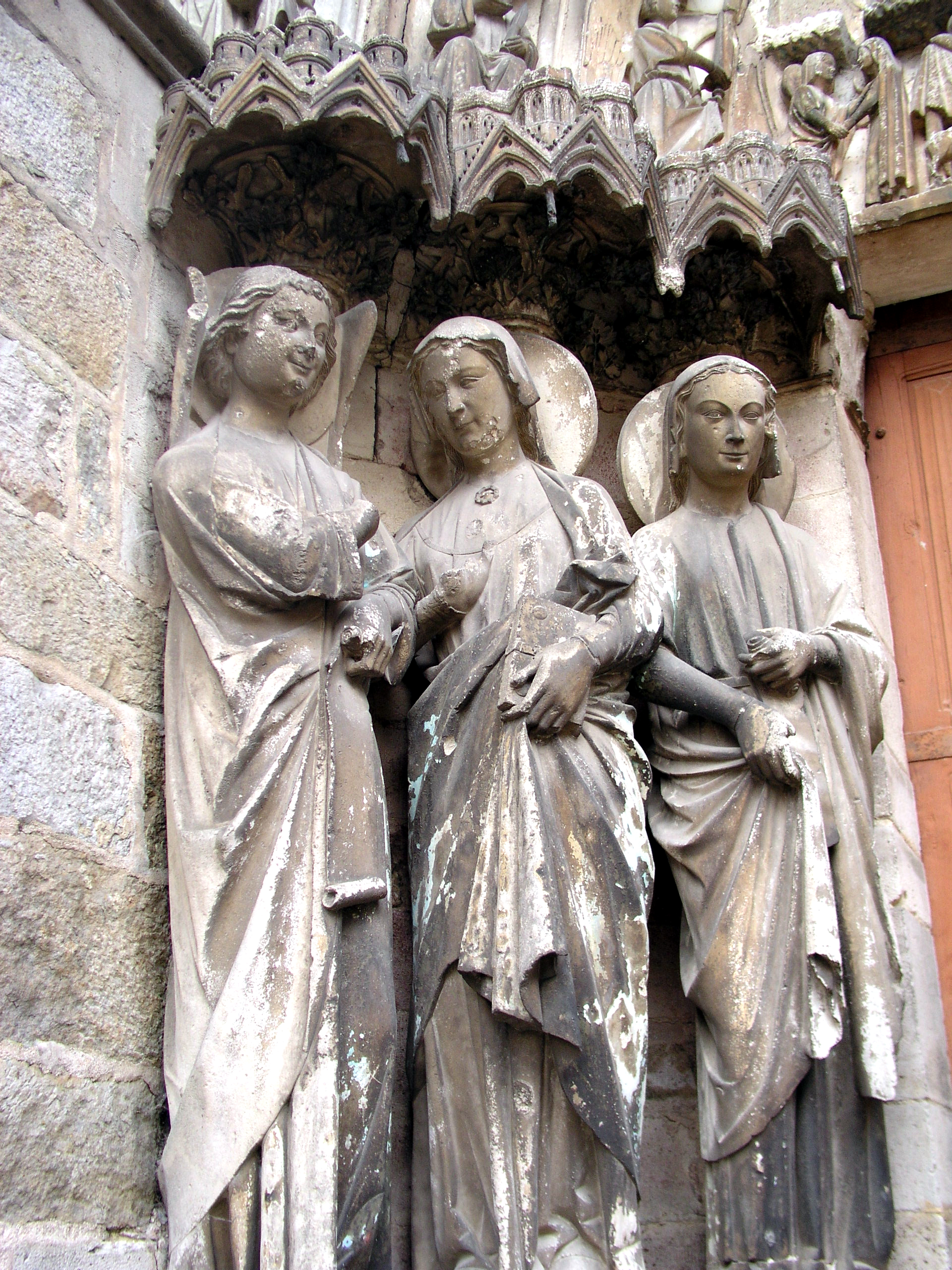 Portail de l'église Notre-Dame consacré à la Vierge et l'enfant